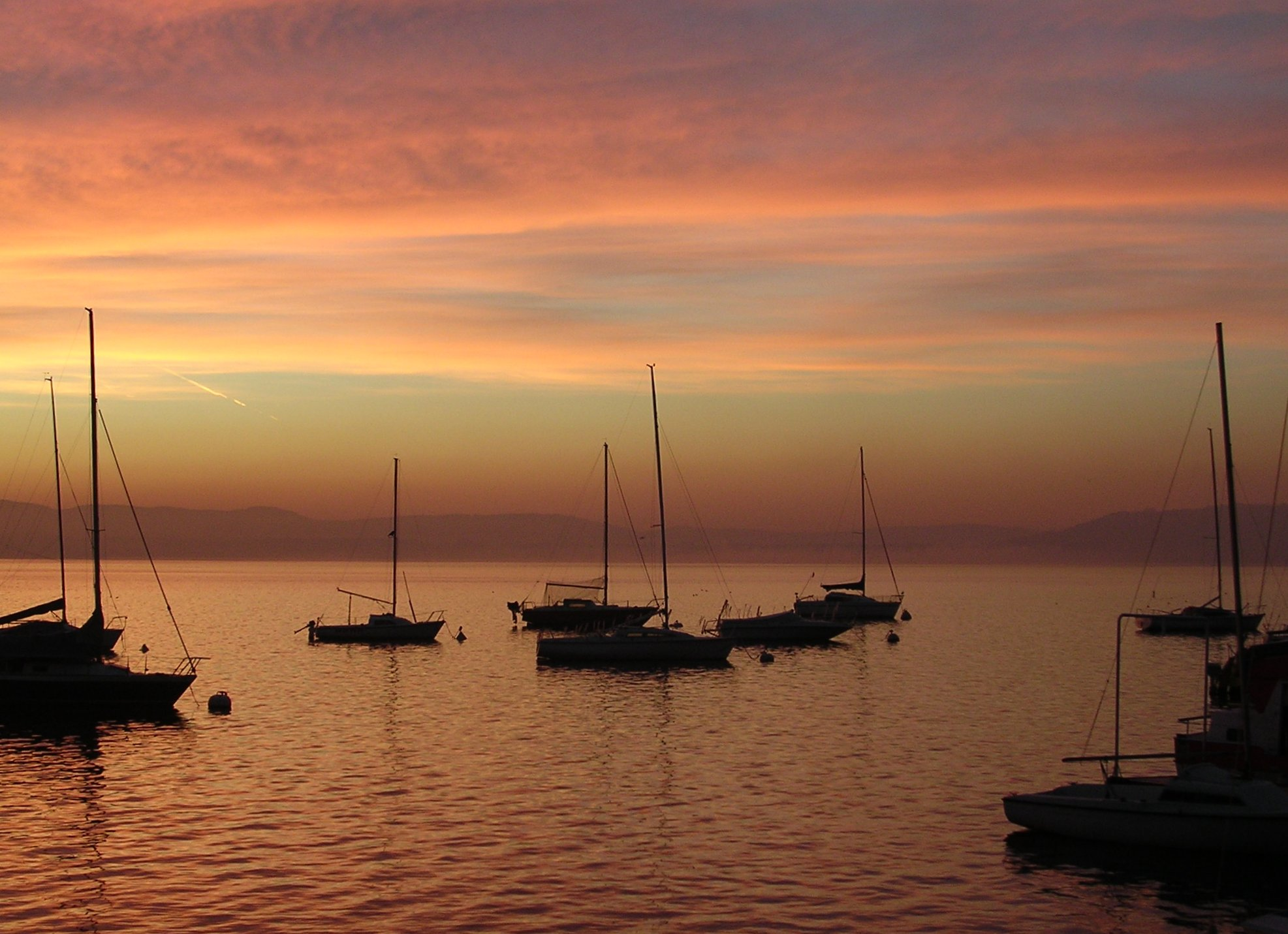 Sunrise over lake Lago Maggiore